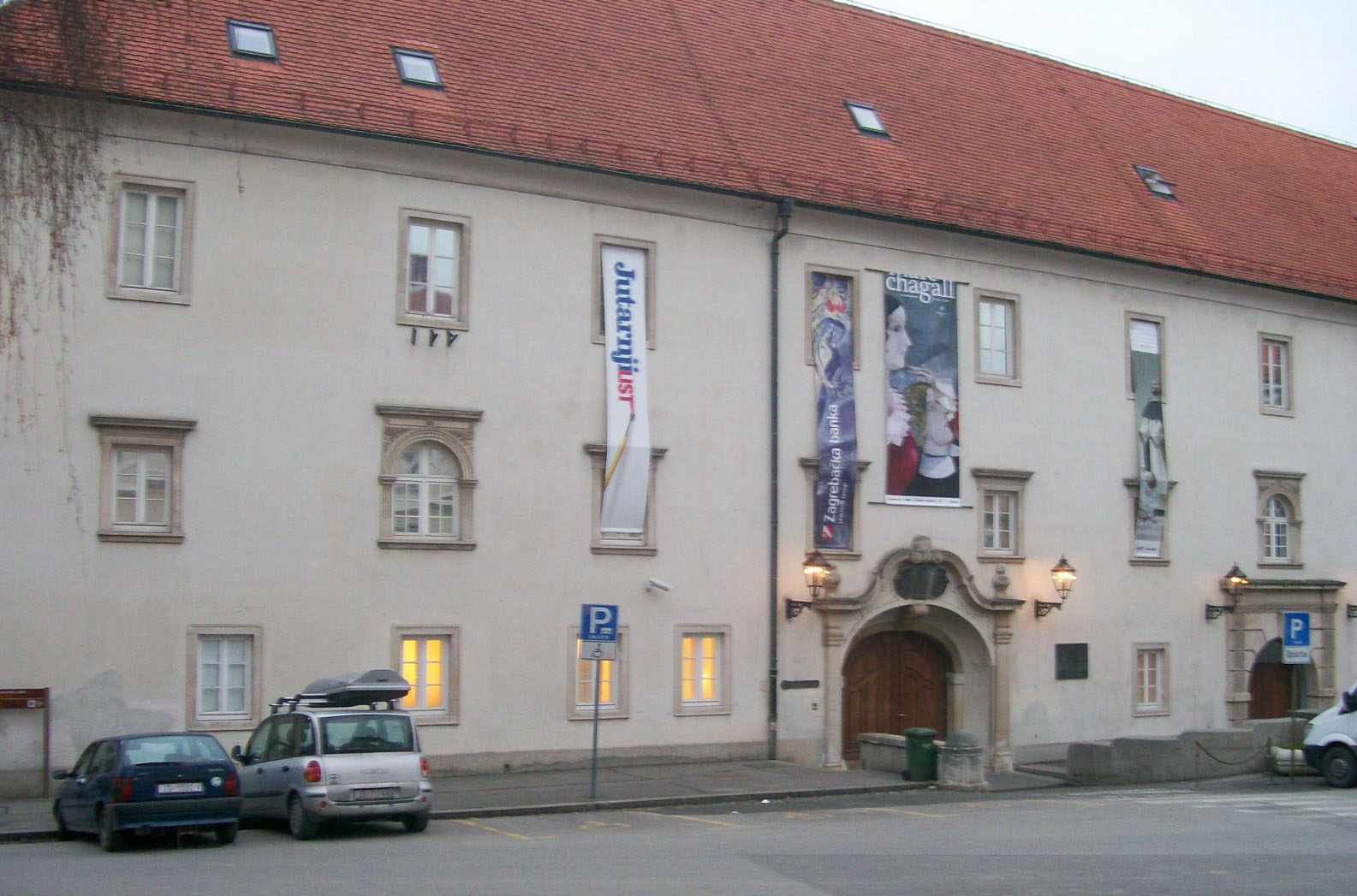 Klovićevi dvori, Zagreb, Gornji grad